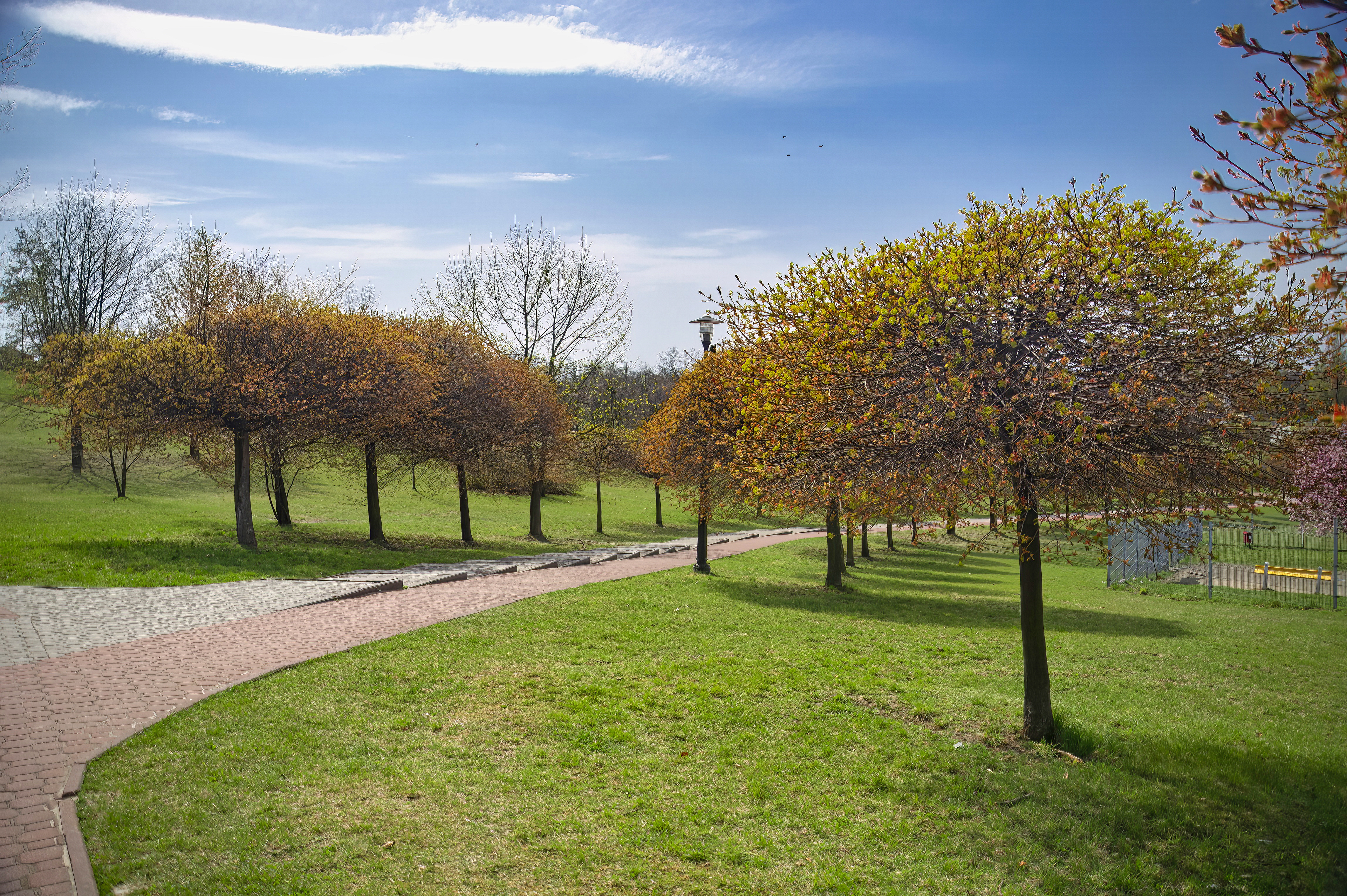 Park Środula Wiosną